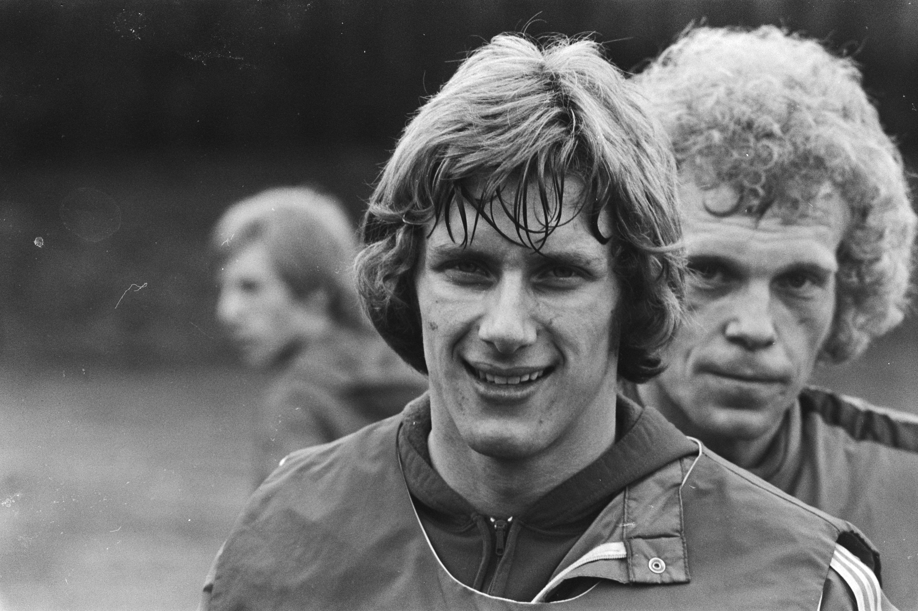 Collectie / Archief : Fotocollectie Anefo Reportage / Serie : [ onbekend ] Beschrijving : Training RWD Molenbeek , Brussel; i.v.m. wedstrijd tegen Feijenoord op 2/3 a.s. Willy Wellens (l) en Bjerre (r), Datum : 23 februari 1977 Locatie : Brussel Trefwoorden : sport, voetbal Persoonsnaam : Bjerre Instellingsnaam : Feyenoord Fotograaf : Verhoeff, Bert / Anefo Auteursrechthebbende : Nationaal Archief Materiaalsoort : Negatief (zwart/wit) Nummer archiefinventaris : bekijk toegang 2.24.01.05 Bestanddeelnummer : 929-0434